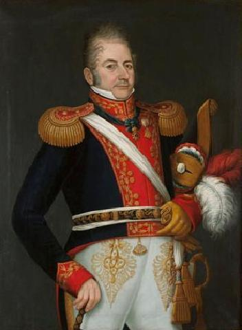 Retrato de Francisco Calderón Zumelzú realizado en 1823 por José Gil de Castro sobre un retrato de Fernando VII de España